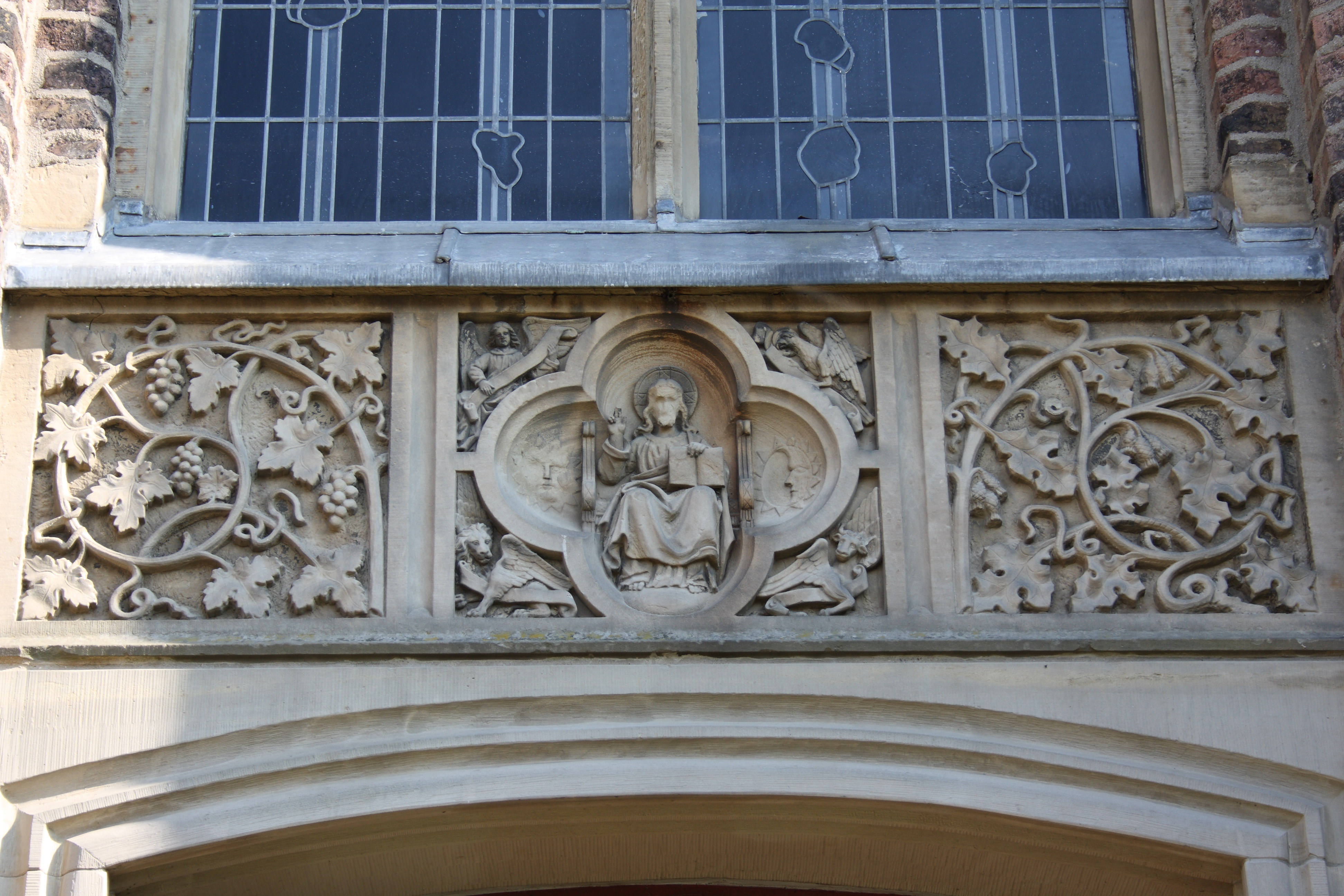 Relief über dem Portal der katholischen Kirche in Weidesheim, einem Stadtteil von Euskirchen